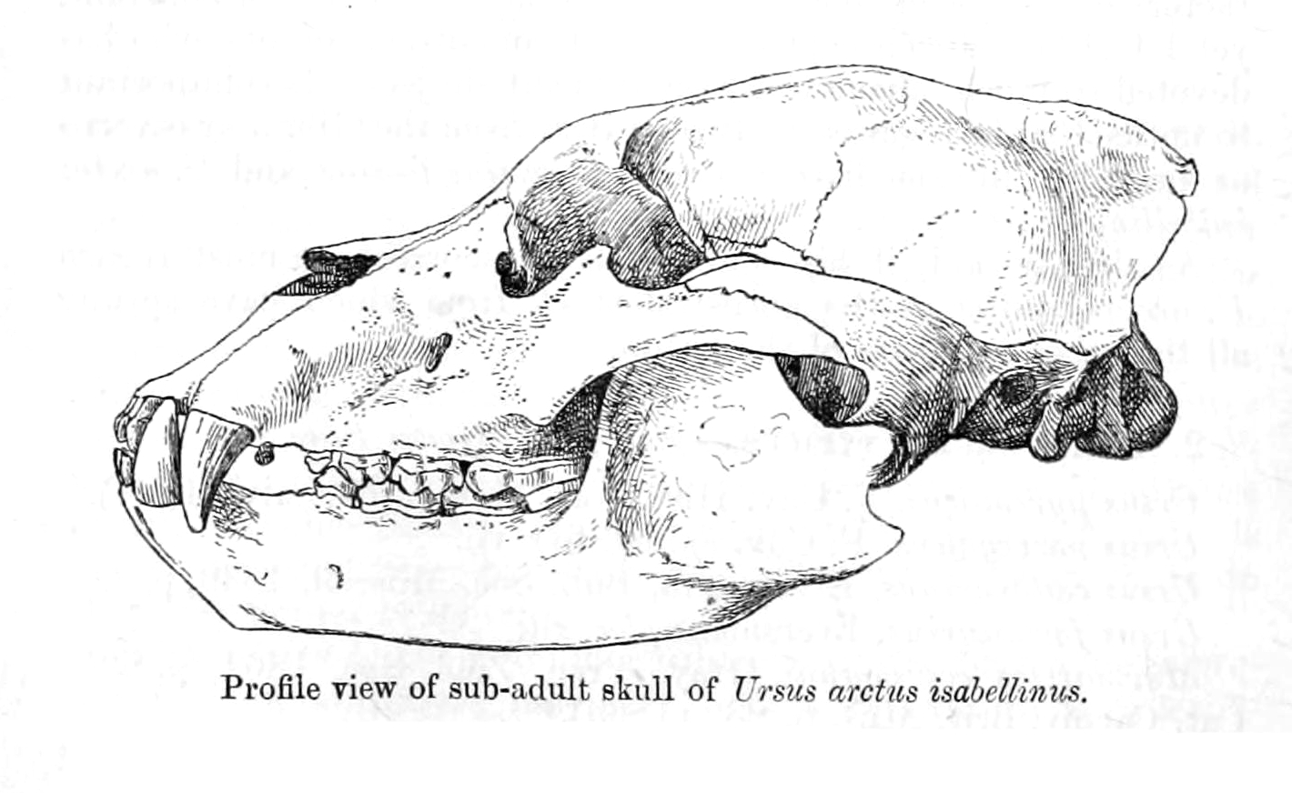 Ursus arctos isabellinus - skull